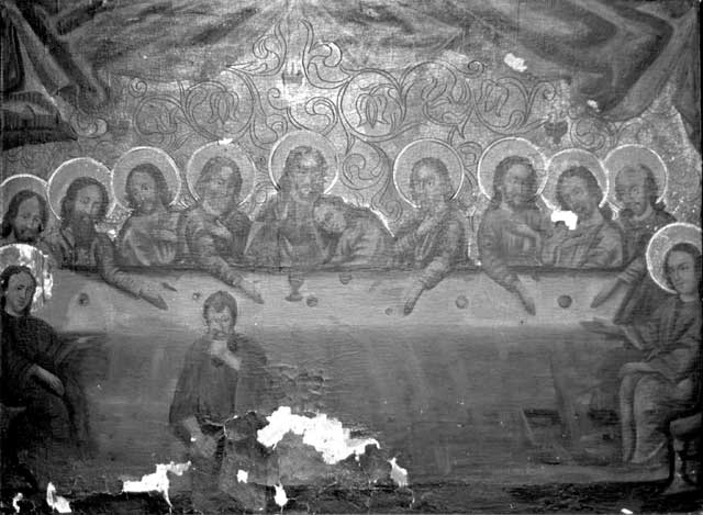 Апошняя Вячэра. Сярэдзіна XVIІI ст. в. Антопаль, Драгічынскі р-н